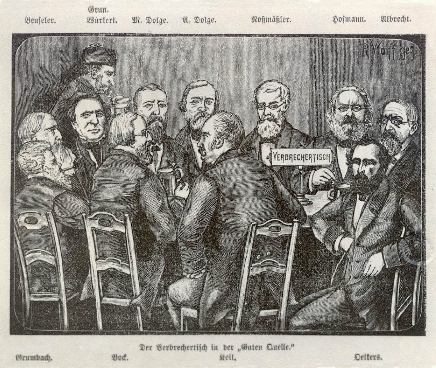 Versammlung von Stammtischgästen am sogenannten „Verbrechertisch“ in der „Guten Quelle“ in Leipzig